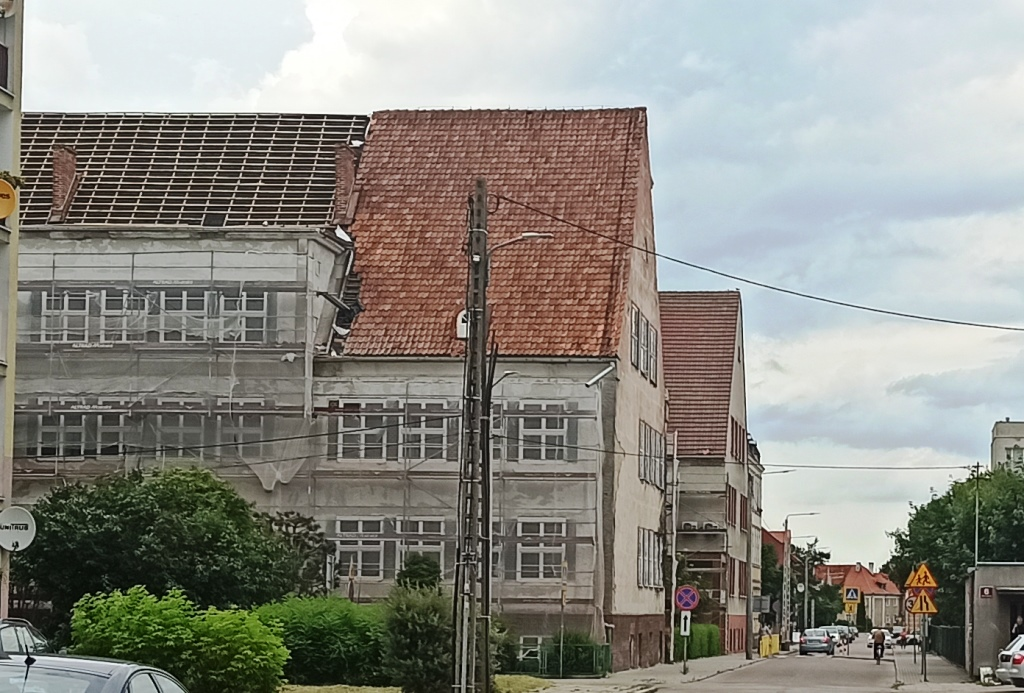 Braniewo szkoła SP6 Architekt Kurt Frick 1926/27 wuchs in der Ackerstraße (ul. Konarskiego) ein neuzeitliches Schulgebäude für die katholische Mädchenvolksschule und die evang. Volksschule empor.